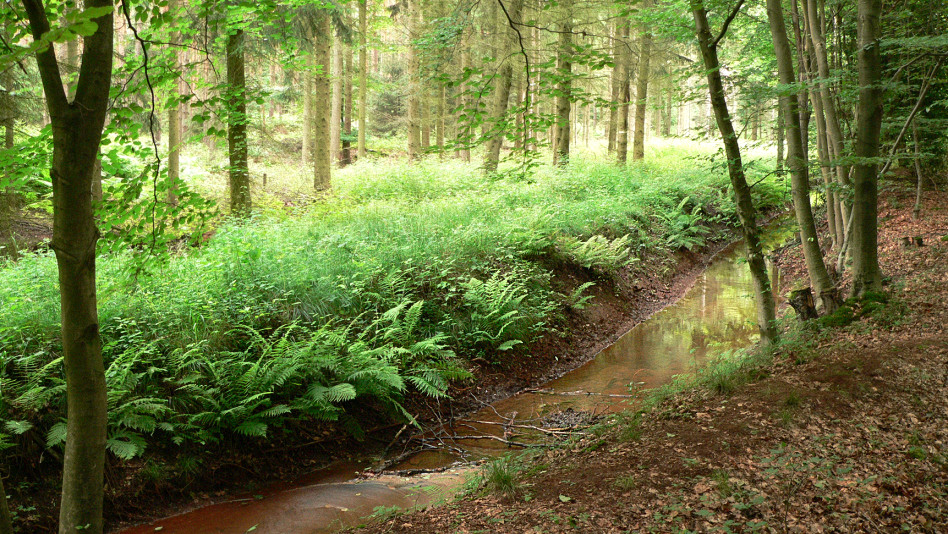 Wölpe beim Heemsen im Wald